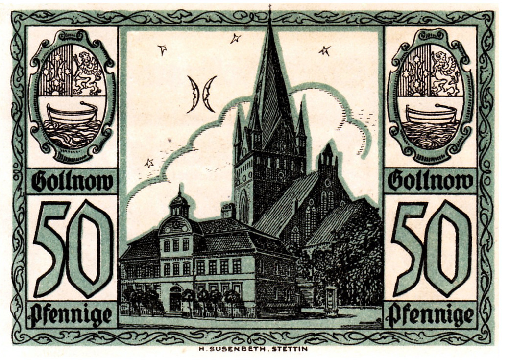 Notgeld o nominale 50 fenigów wydany w Goleniowie (niem. Gollnow) w 1921 roku